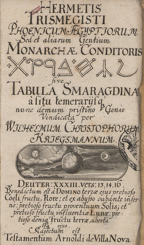 Original image description from the Deutsche FotothekTheosophie & Alchemie